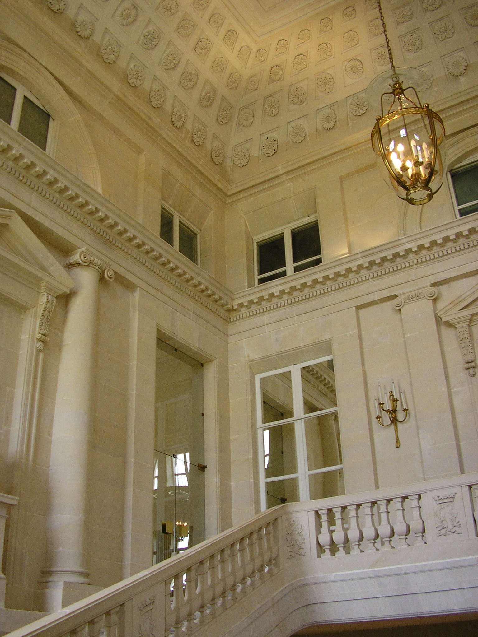 escalier monumental à volée droite, chateau de Benouville, Calvados, France